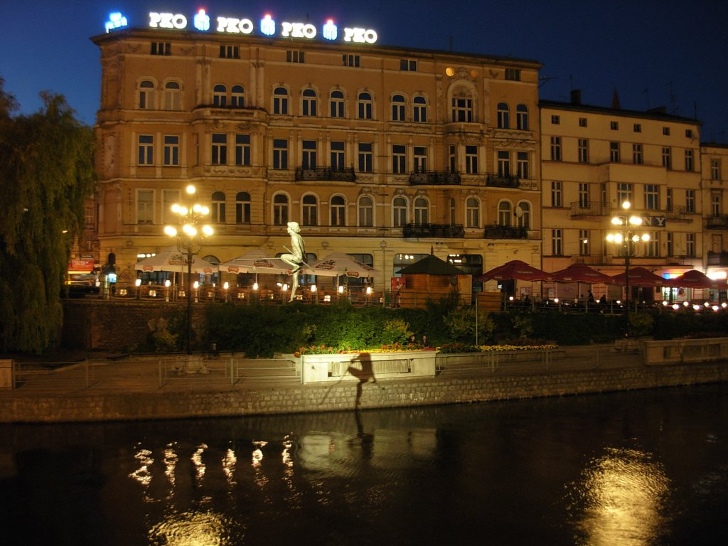 Kamienica nad Brdą w Bydgoszczy